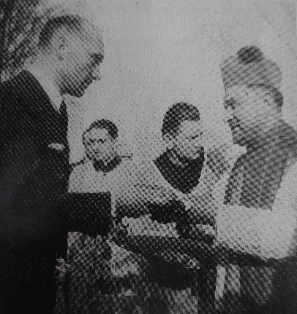 Stargard, lata 40. W środku ks. kapelan, proboszcz, dziekan Alojzy Piłat TChr podczas powitania przez władze Stargardu ks. infułata Edmunda Nowickiego